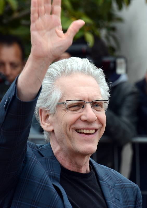 David Cronenberg au festival de Cannes